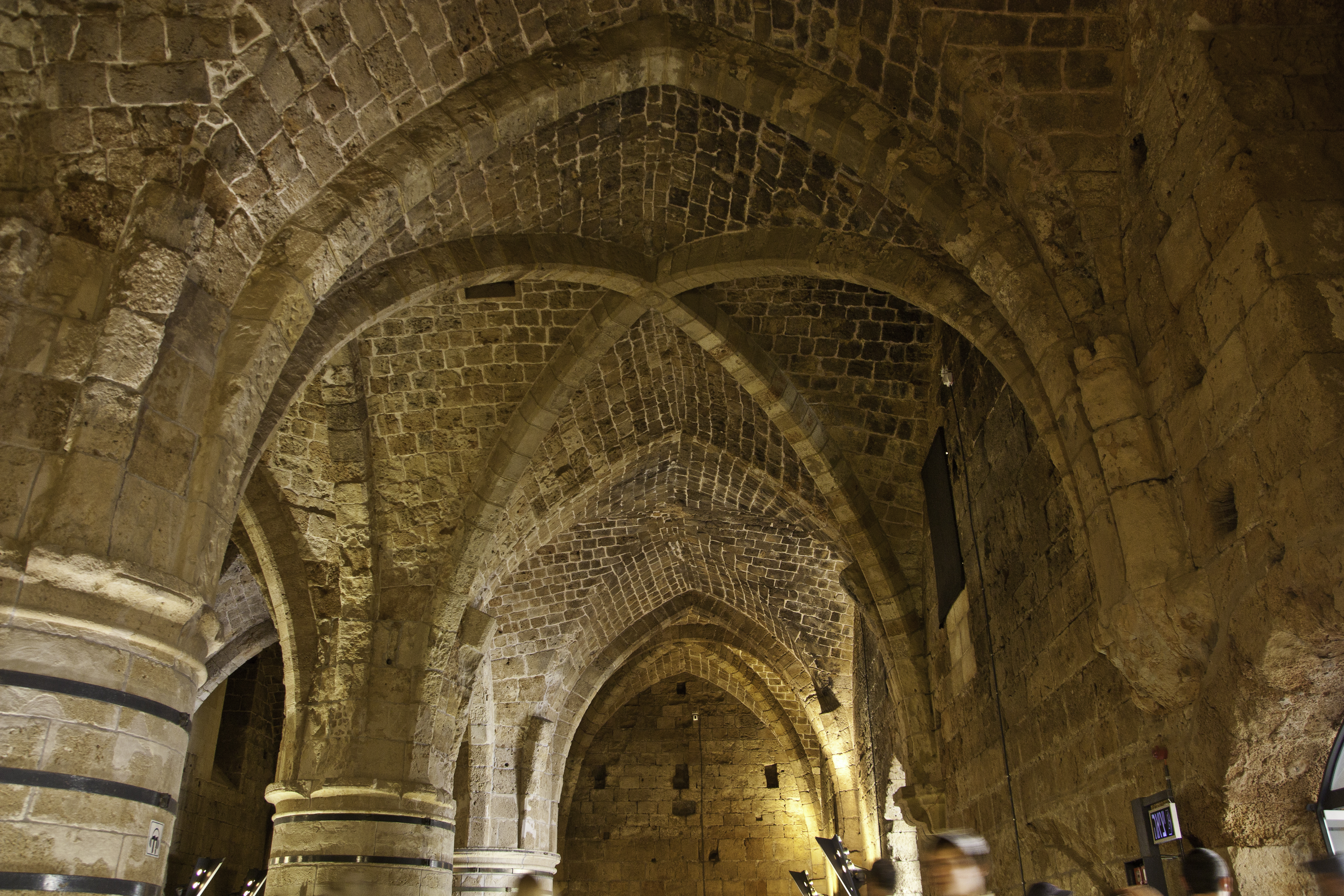 Johanniterkommende Akko: Refektorium im romanisch-gotischen Übergangsstilby Alberto Peral Acre